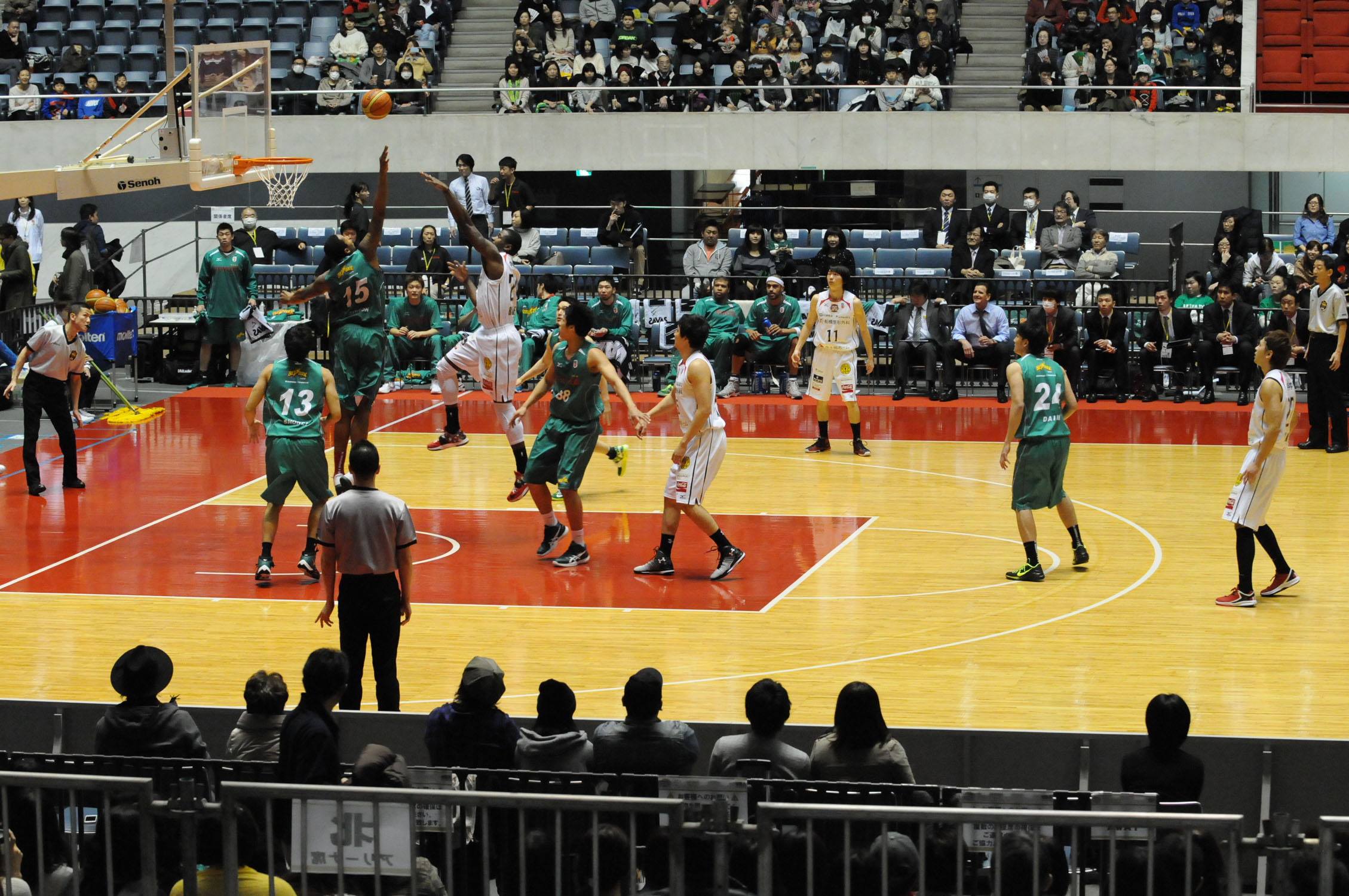 2015年全日本総合バスケットボール選手権大会準々決勝、千葉ジェッツ対トヨタ自動車アルバルク東京。代々木第一体育館で。